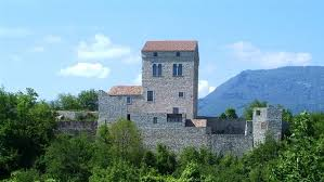 Foto del Castello di Ragogna eseguita personalmente